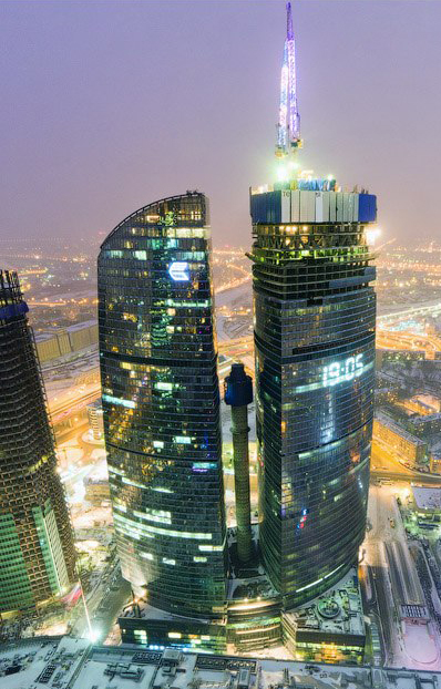 зима 2012